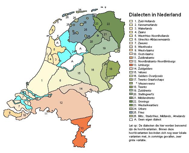 Overzichtskaart van de verschillende dialecten in Nederland. Nijere versie in t Grunnegs: hier